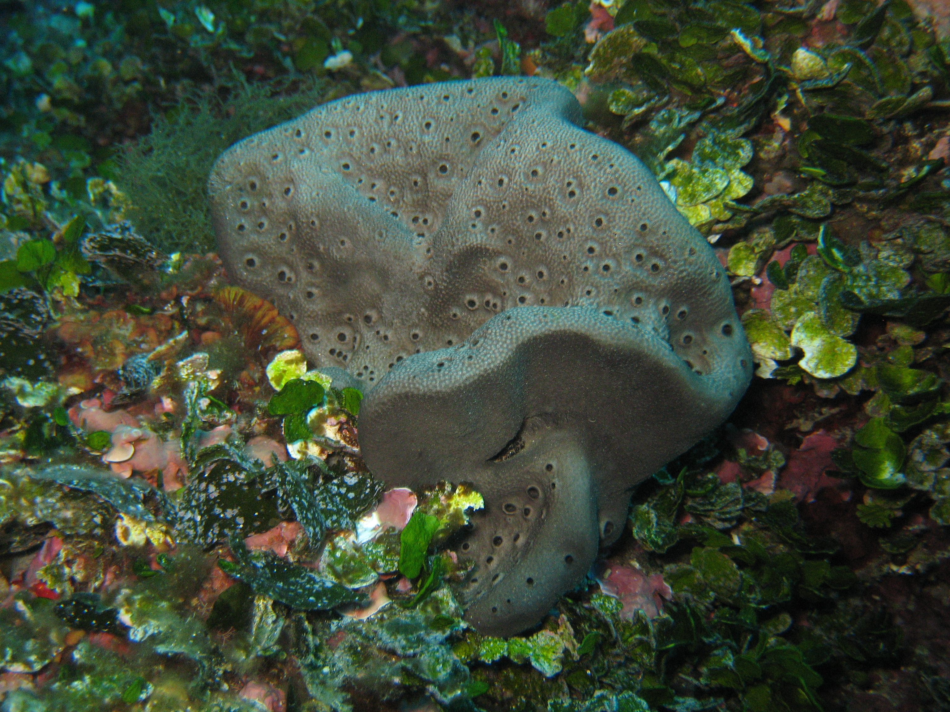 Éponge oreille d'éléphant de Méditerranée (Spongia lamella) près de La Ciota